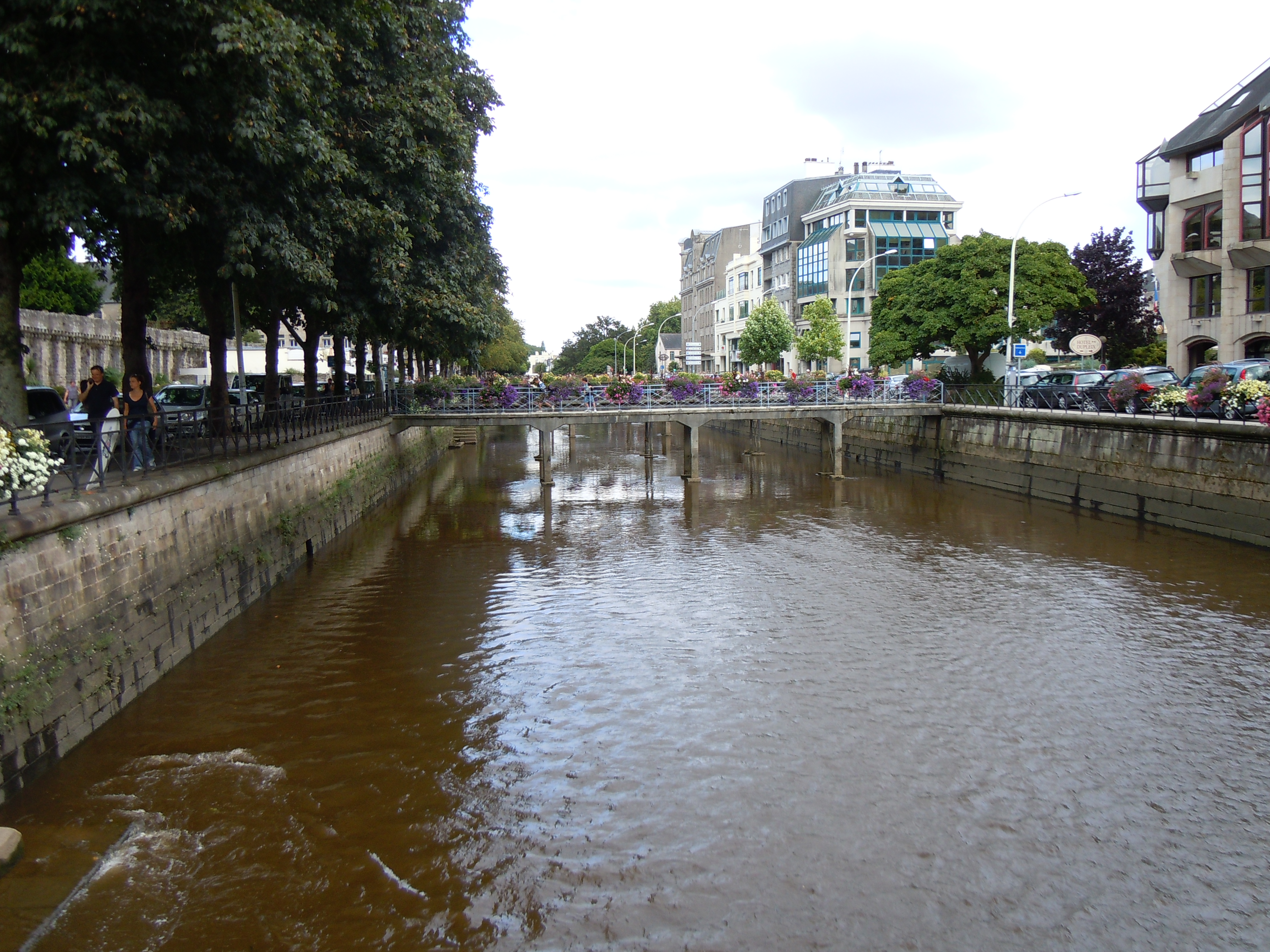 la rivière Odet dans la ville de Quimper, département du Finistère, France